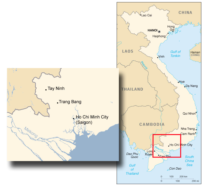 Karte Trangbang